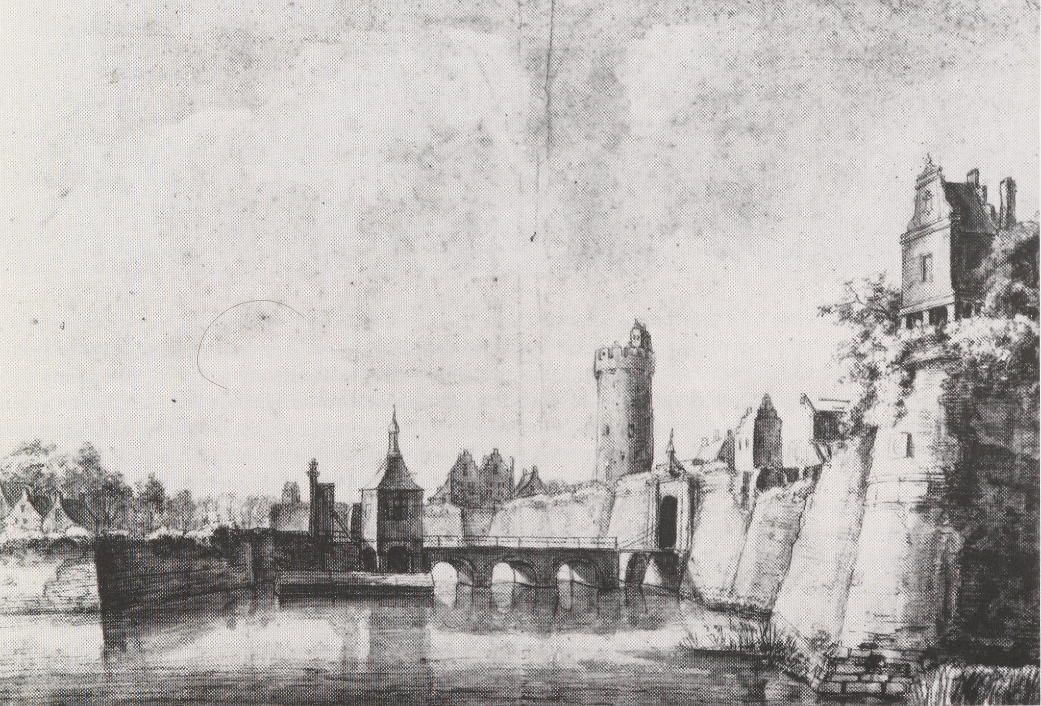 Gezicht vanuit het oosten op het zuidelijke deel van de stad Utrecht, met de verdedigingsgracht (Stadsbuitengracht) en van rechts naar links bastion Manenburg, de Tolsteegpoort als stadspoort, bastion Sterrenburg en geheel links nog zichtbaar enige huizen in het buiten de stadsmuren gelegen Vaartse Rijn. De hoge toren is de Bijlhouwerstoren.